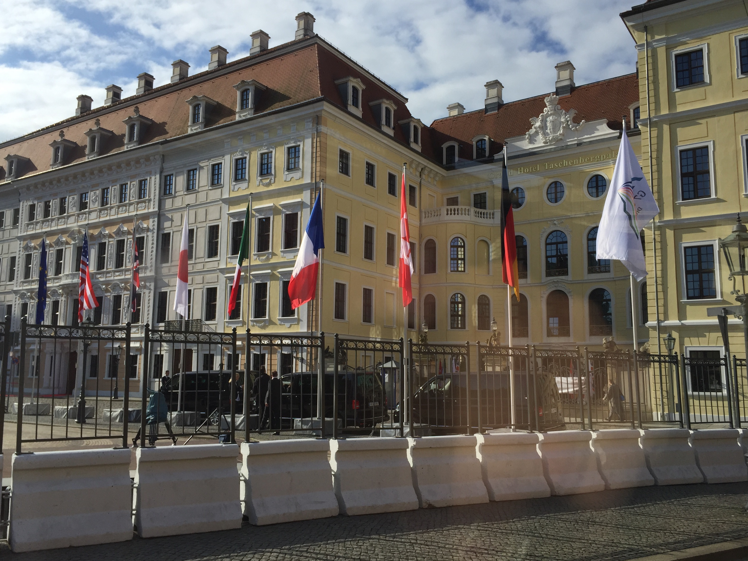 G7 Summit 2015 Dresden